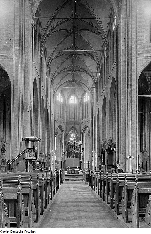 Original image description from the Deutsche Fotothek Schwerin. Dom, Innenansicht mit Blick auf den Altar